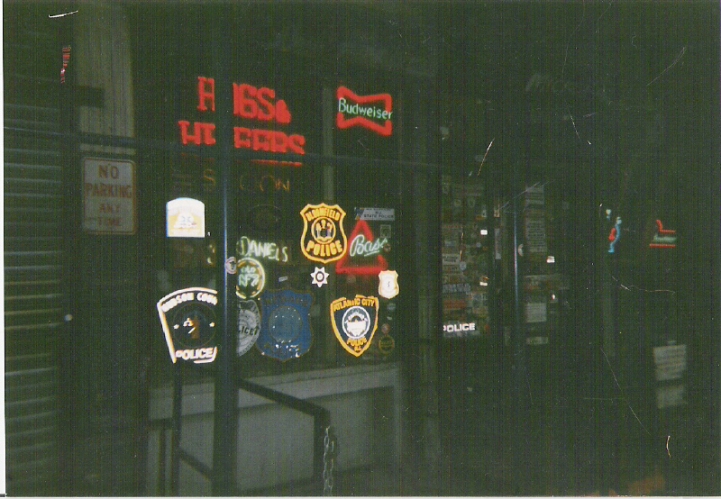 Hogs & Heffers, een saloon in NYC waar de film "Coyote Ugly" op is gebaseerd. Zelf gemaakt in 2000, rond 2 uur 's nachts.